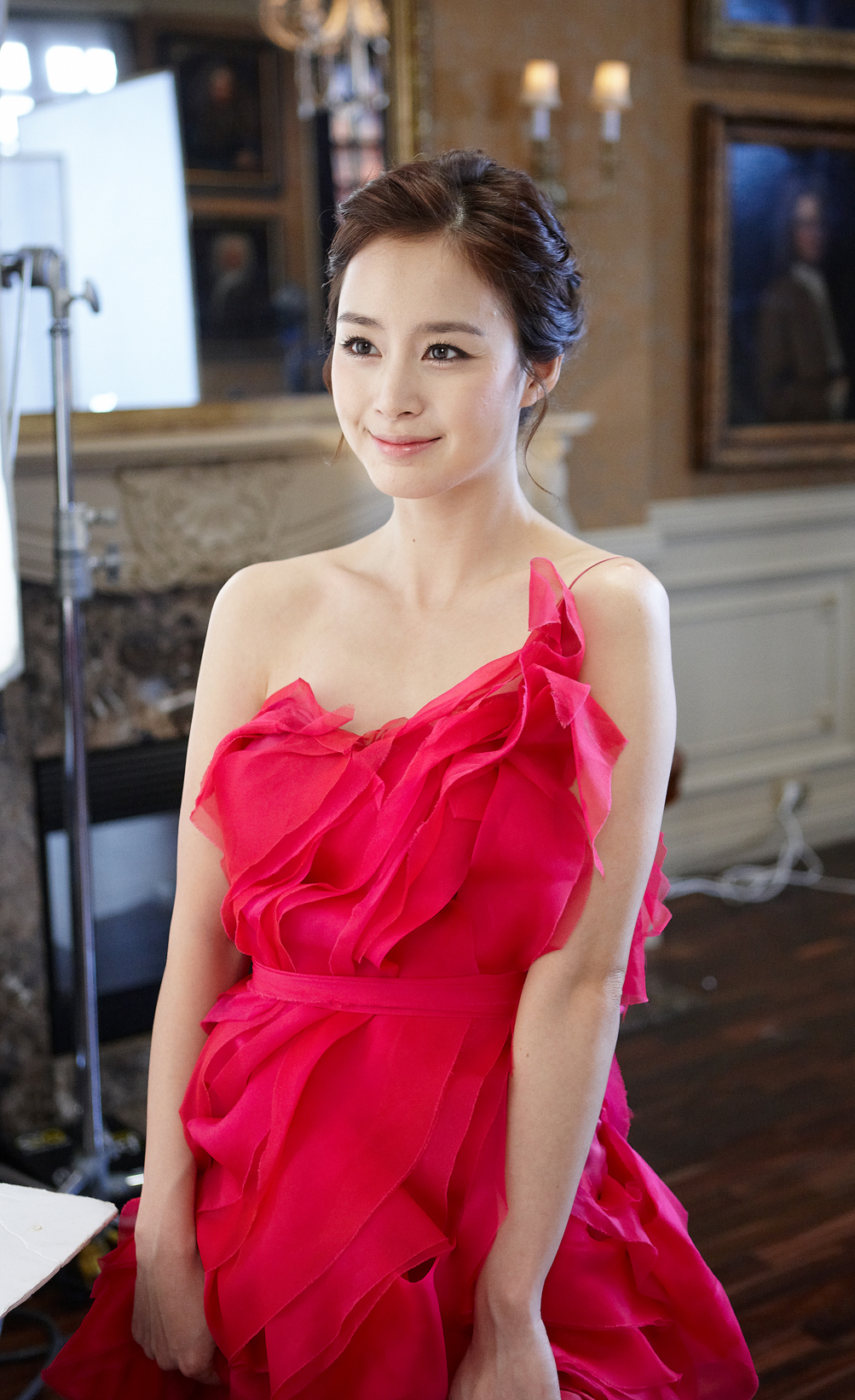 LG 옵티머스 3D & LG 시네마 3D] TV CF 촬영 사진에 나온 김태희